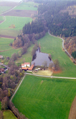 Luftaufnahme der Mittelmühle